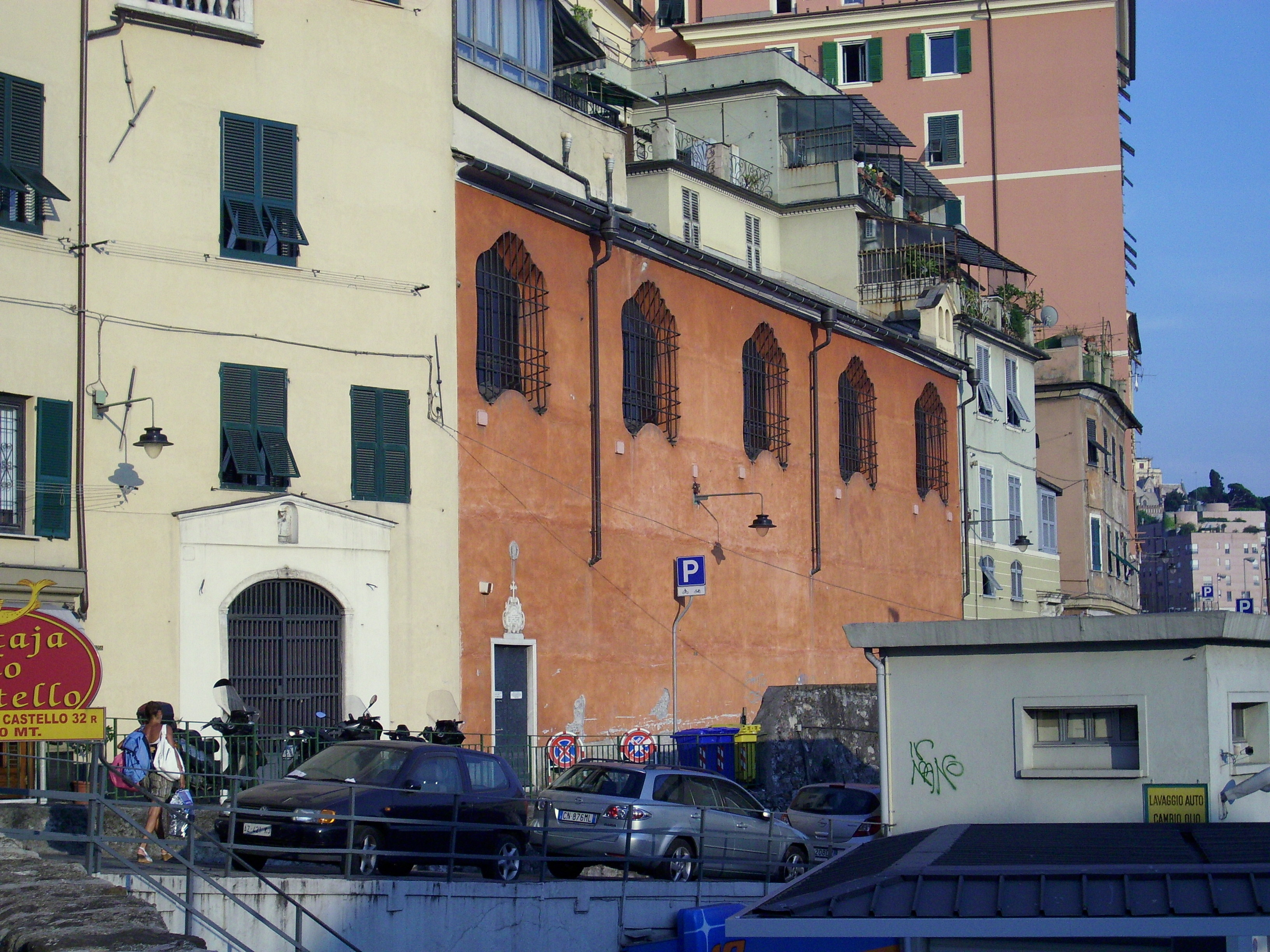 L'oratorio di San Giacomo della Marina a Genova